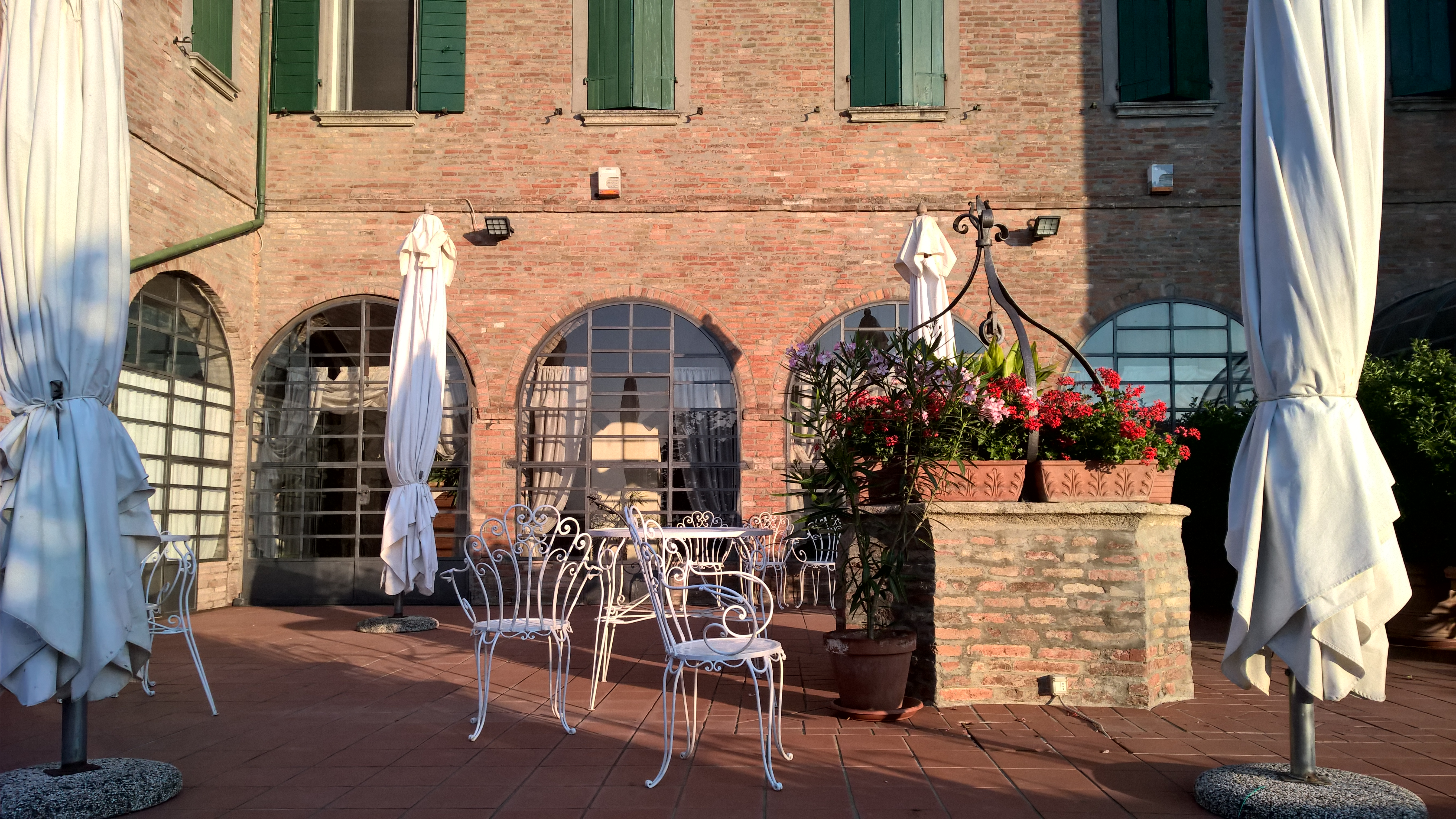 Palazzo Astolfi (Poggio Torriana, Italia). Particolare della corte con pozzo sul lato NO dell'edificio.